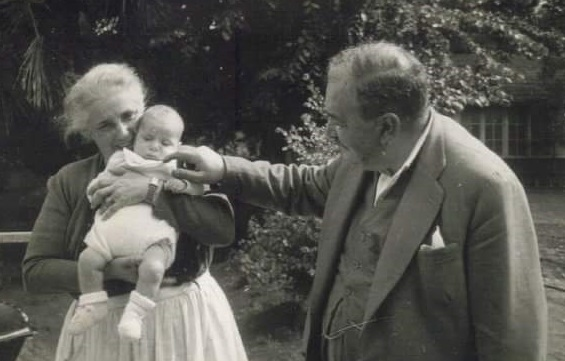 Hacia fines del siglo XIX en la zona de Renaico se establecieron familias inmigrantes que se dedicaron a las actividades agrícolas como principal actividad económica. En 1893, Ricardo Izaurieta Gardoqui, llegó a Chile a muy temprana edad proveniente de la provincia de Vizcaya, País Vasco. Se estableció en Concepción, donde desarrolló actividades comerciales, para luego asociarse con Ambrosio Bilbao y Lucas Avendaño, también inmigrantes vascos, con quiénes se dedicó a la explotación agrícola bajo la razón social "Fundo Munilque ", en la provincia de Bío-Bío. Posteriormente Ricardo Izaurieta adquirió el Fundo 'Venecia', en la .zona de Renaico, al que llamó "Elordui", en honor al caserío de su familia en Barrika, Vizcaya, su tierra natal a la que pudo volver muchas veces y donde aún existe el caserío. Ricardo Izaurieta Gardoqui fue también presidente de la.Beneficencia Española y el Centro Español de Concepción, donde uno de sus salones lleva su nombre.Su hijo Enrique Izaurieta Arestizábal continuo con su labor.